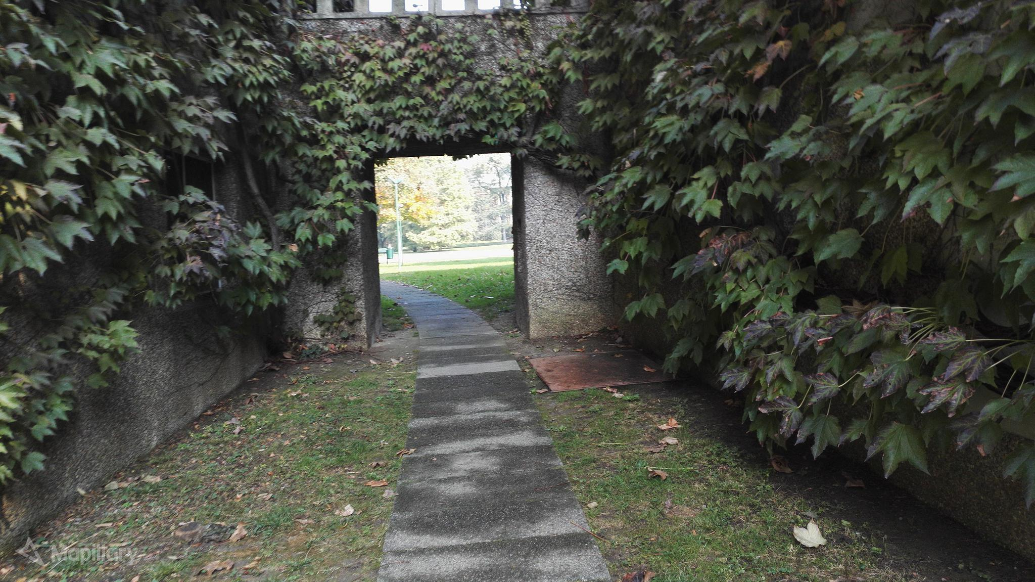 Ingresso nei giardini "golfi" di milano san felice